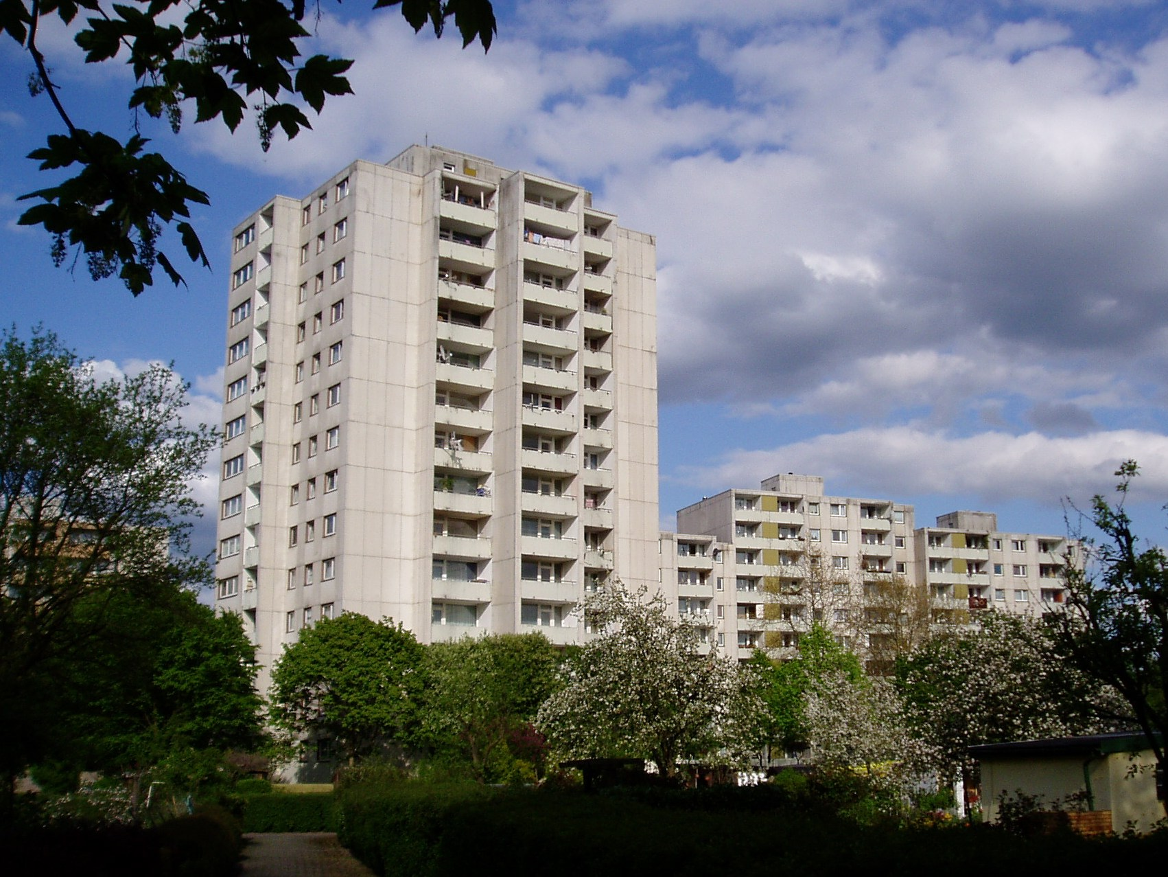 Wohnblocks an der Gernsheimer Straße in Köln-Ostheim